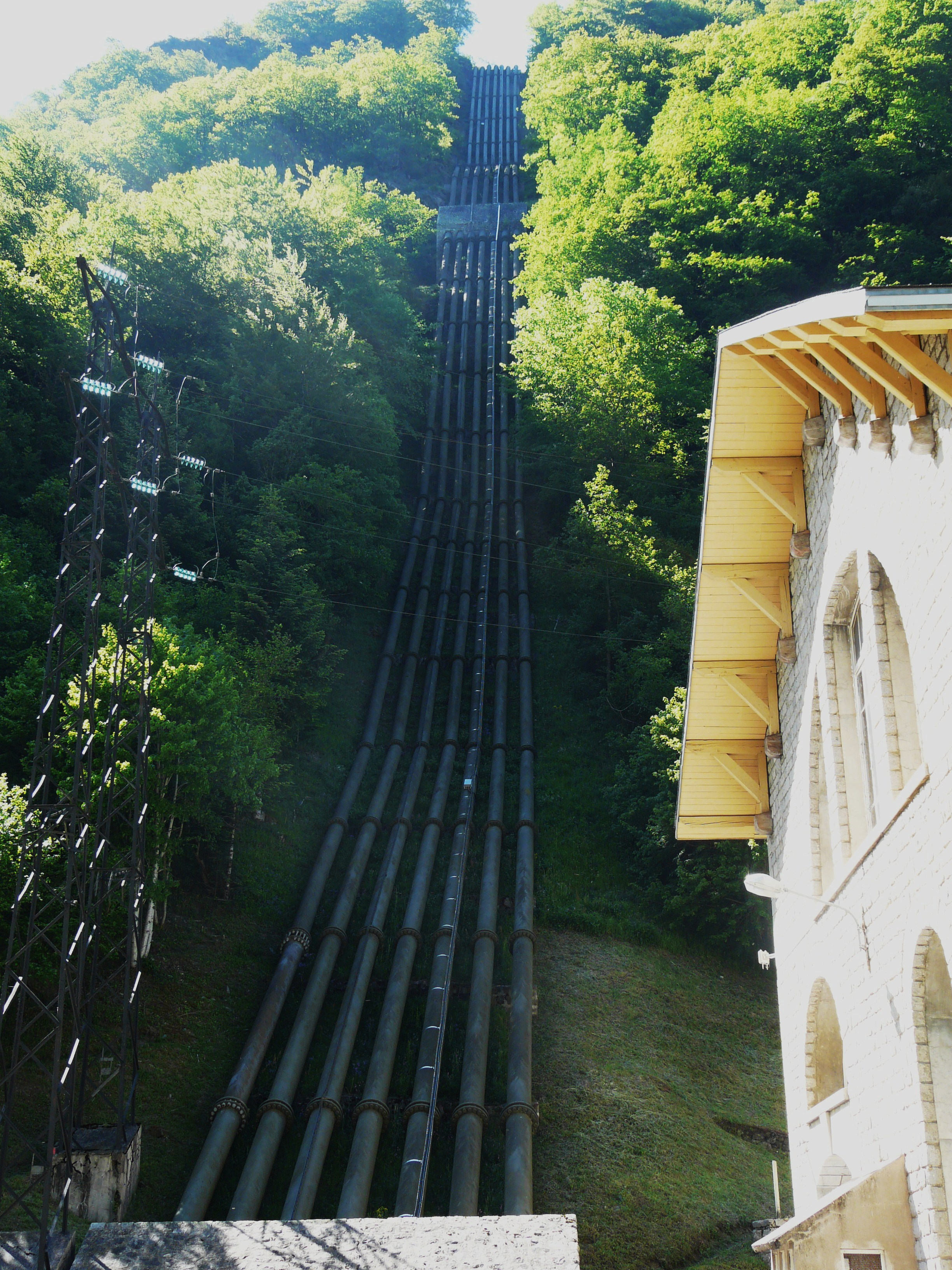 Les 7 conduites forcées qui alimentent en eau la centrale hydroélectrique d'Éget, Aragnouet, Hautes-Pyrénées, France.